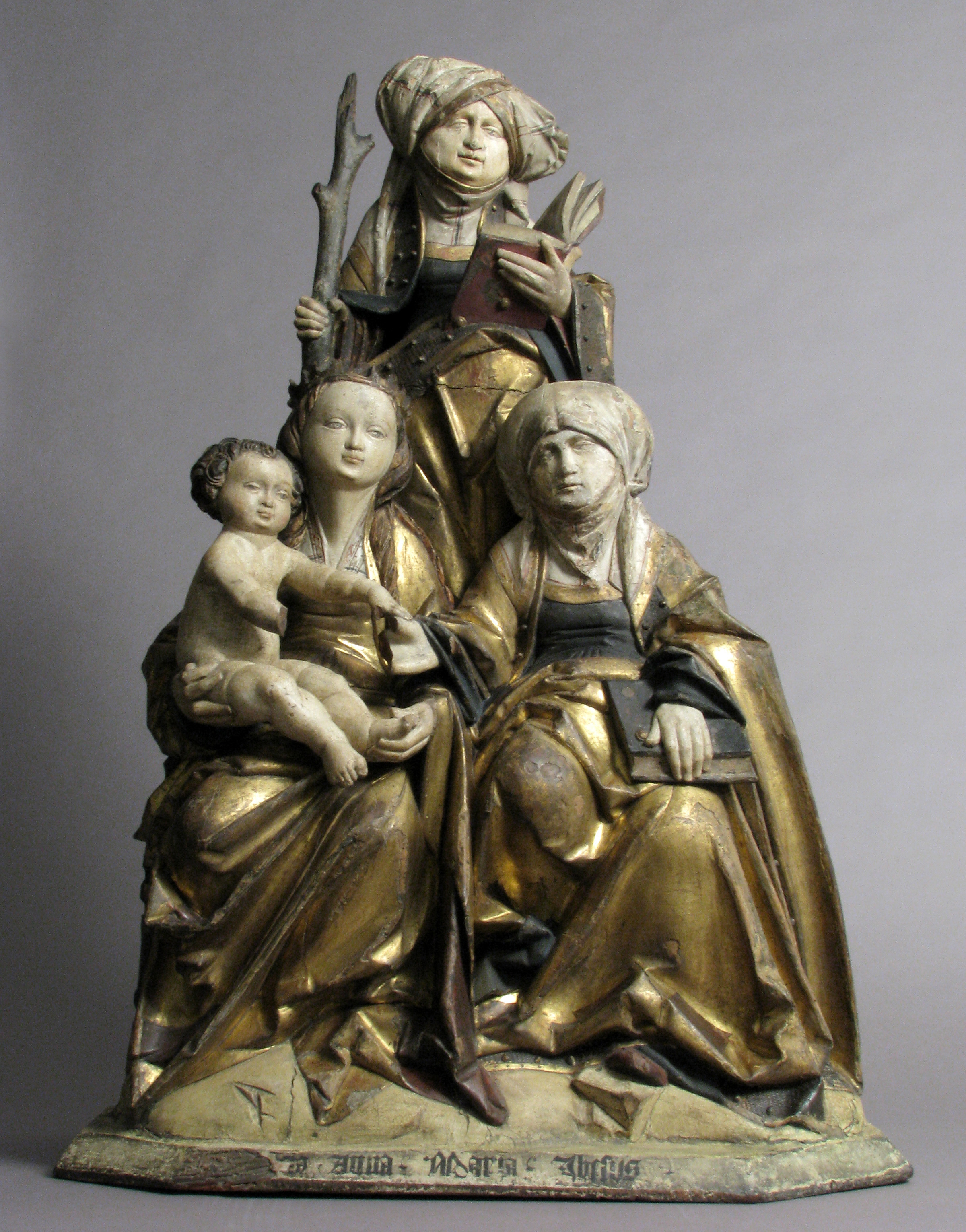 Sainte Anne quaternaire (Anna selbviert) conservée au Metropolitan Museum of Art. Sculpture en bois de tilleul, polychrome et doré, probablement réalisée à Hildesheim (Basse-Saxe, Allemagne), vers 1515-1530. L'inscription fragmentaire en lettres gothiques sur la base du socle ([Emeren] cia / Anna / Maria / Jhesus) permet d'identifier les quatre personnages.